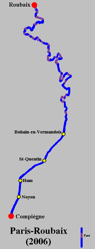 Percorso Paris-Roubaix 2006 di ciclismo